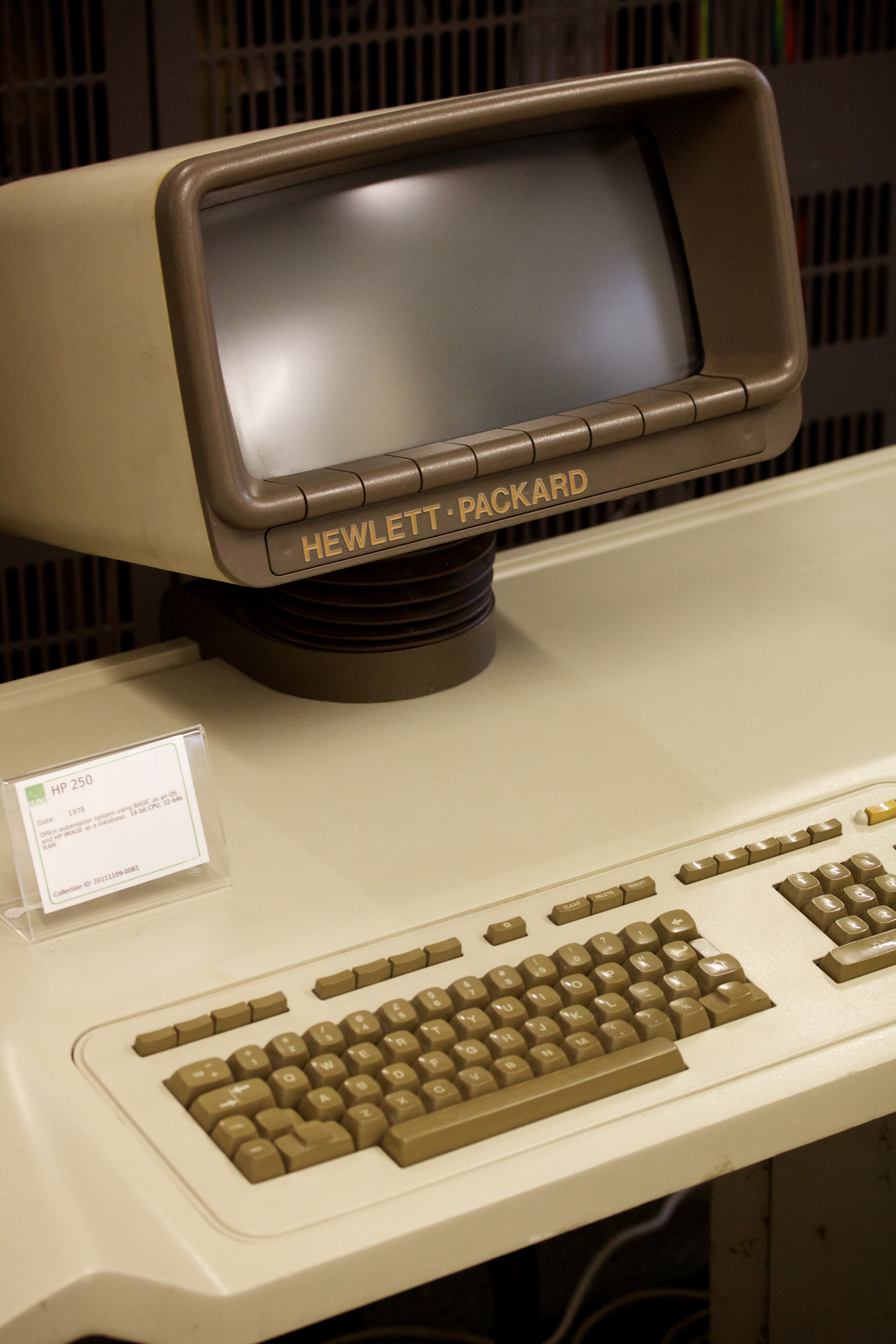 Hewlett Packard HP-250